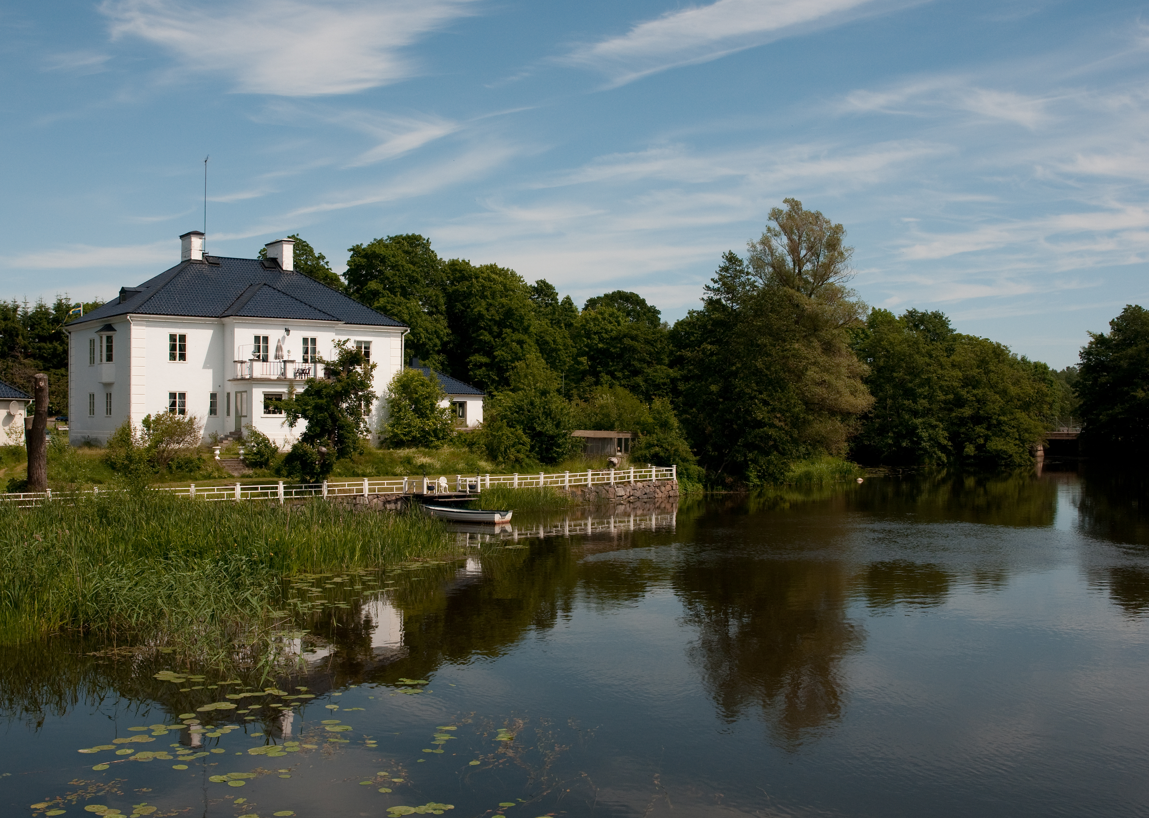 F.d. ingenjörsbostaden Blåhamra vid Hargs fabriker i Nyköping